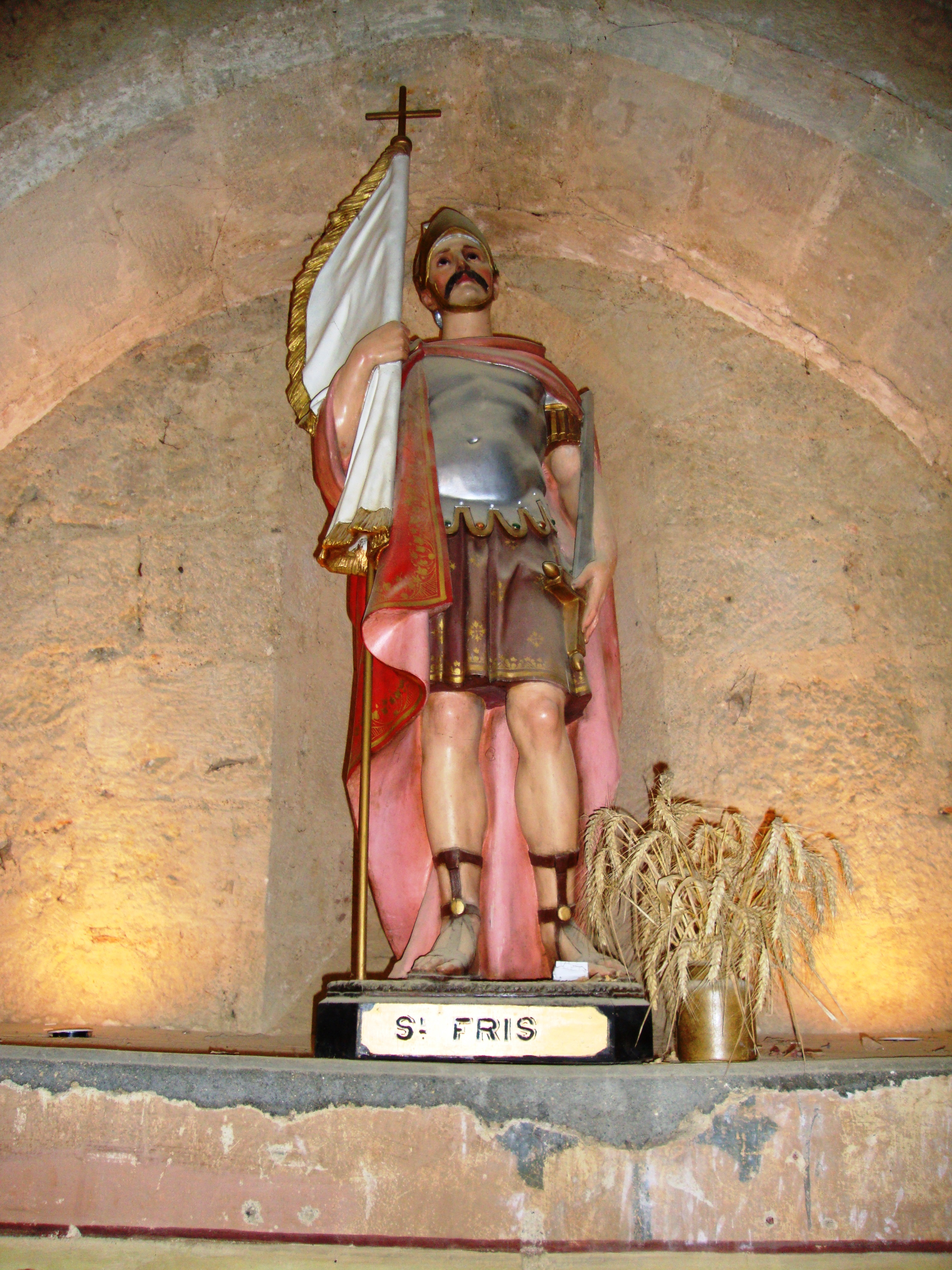 Bassoues (Gers) église paroissiale, statue St.Fris